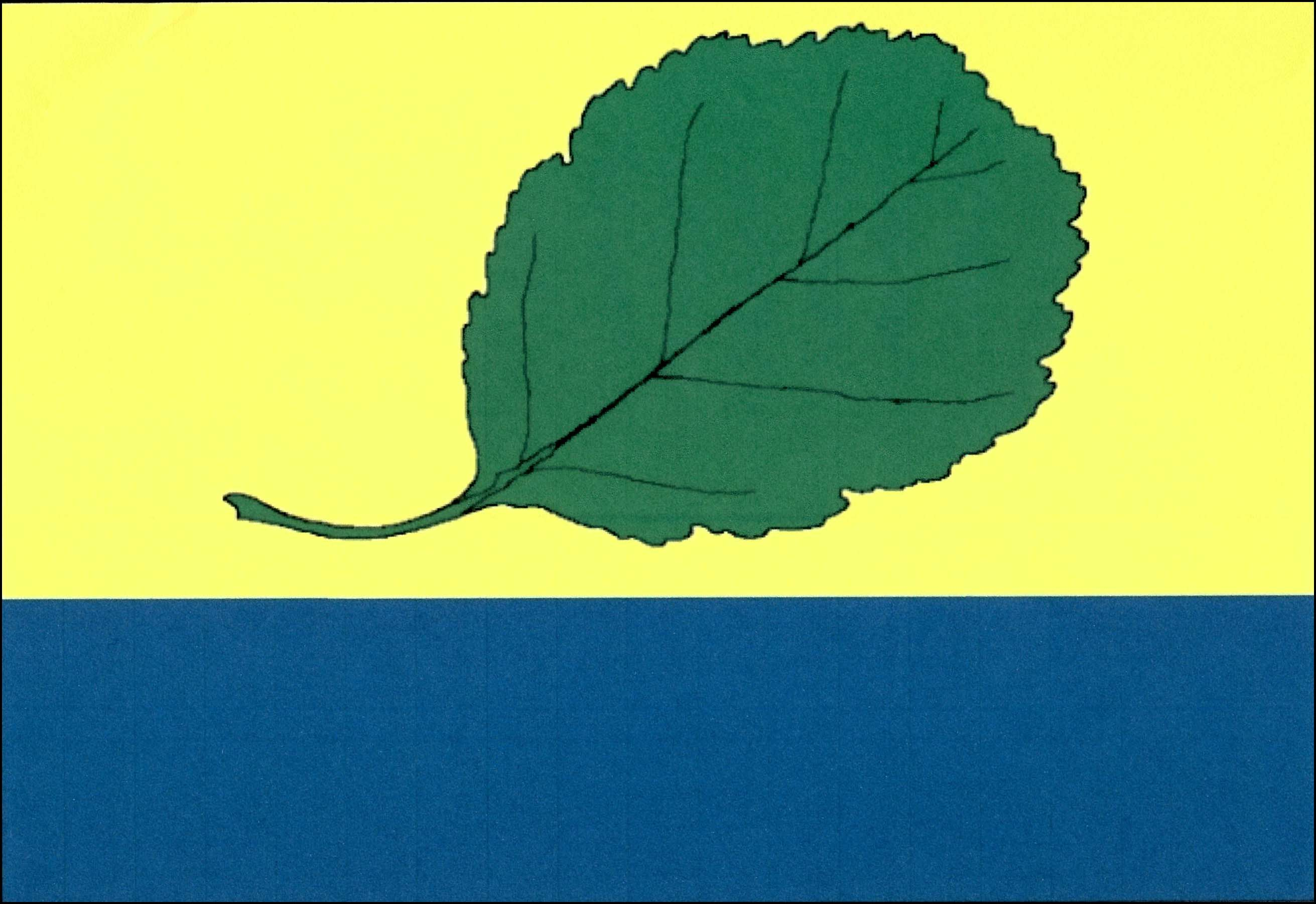 Vlajka obce Leštinka